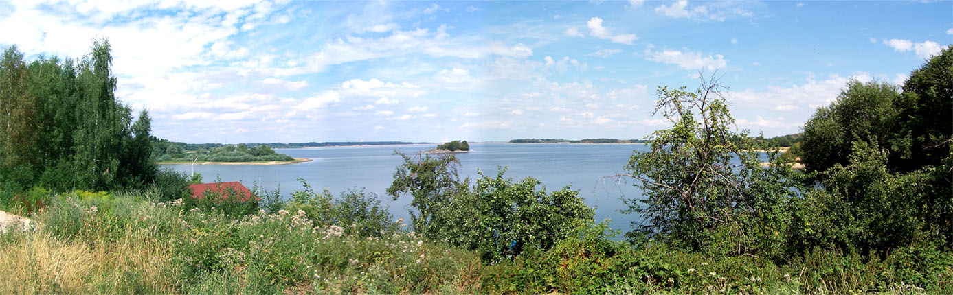 Talsperre Bautzen, Bautzen, Germany